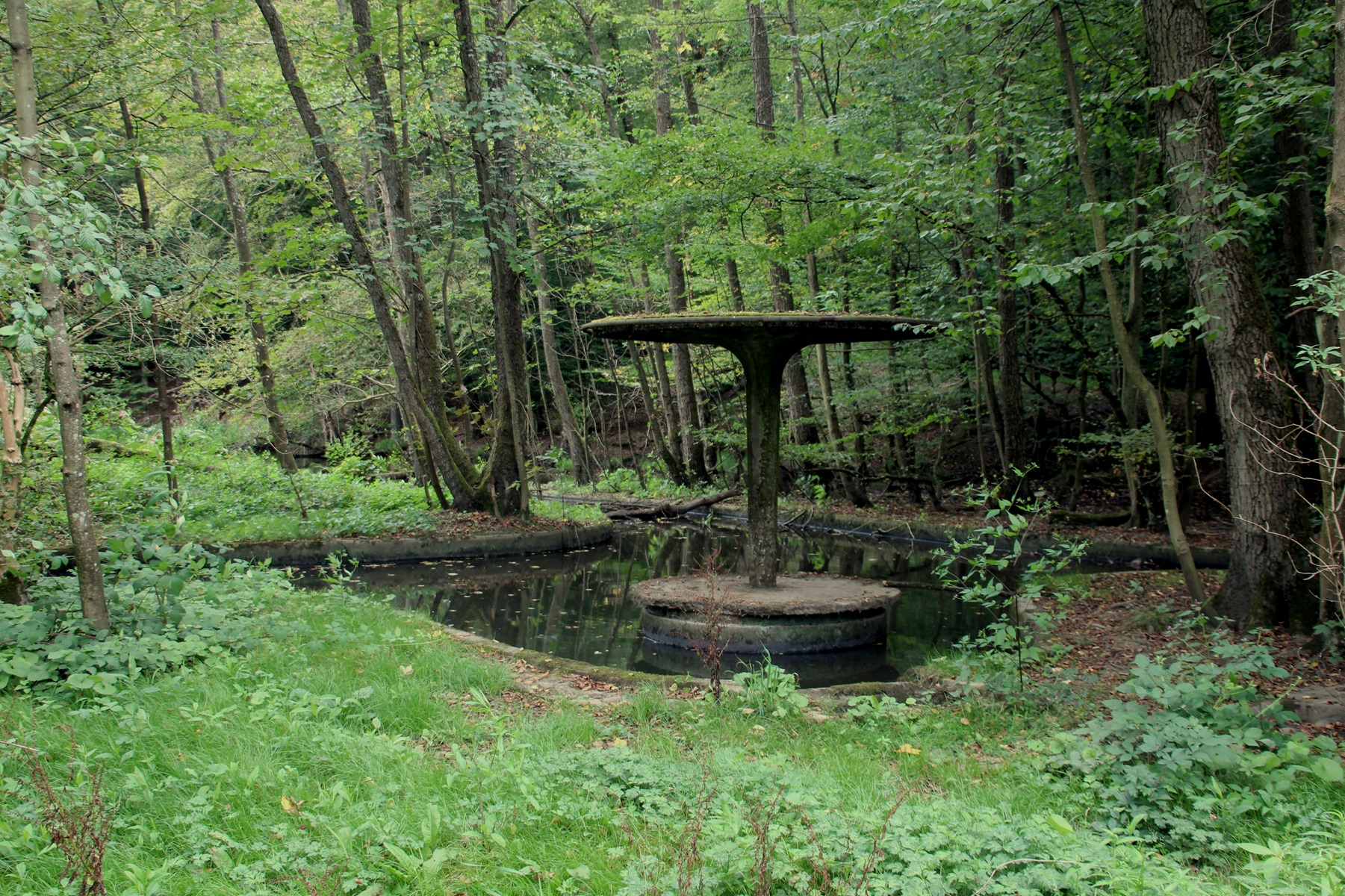 Badepilz des ehemaligen Fischbachbades